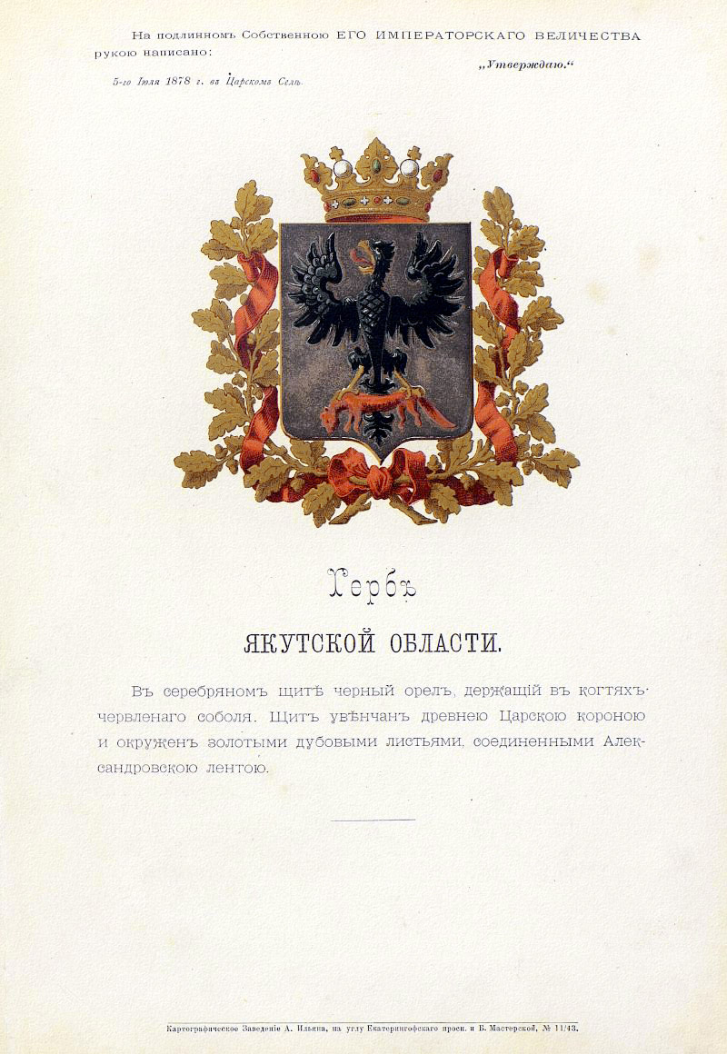 Official Russian Empire coat of arms Yakutsk Oblast. Герб Российской Империи Якутской области с официальным описанием в Гербовнике Бенке. Утверждён Императором Всероссийским Александром Вторым в 1878 году.